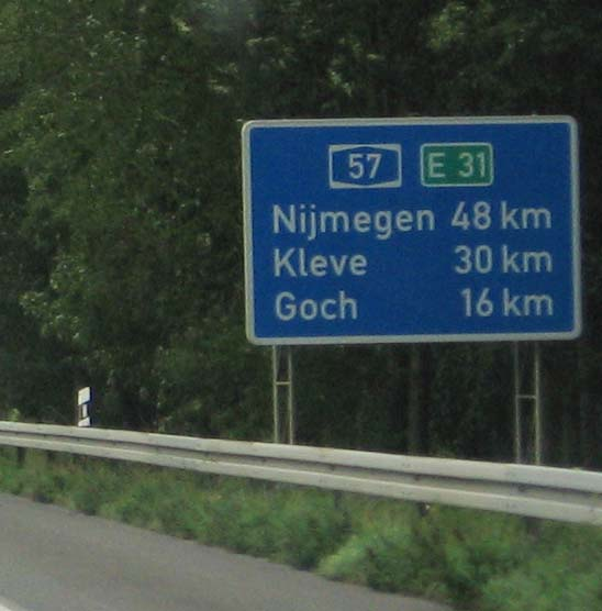 Bundesautobahn_57